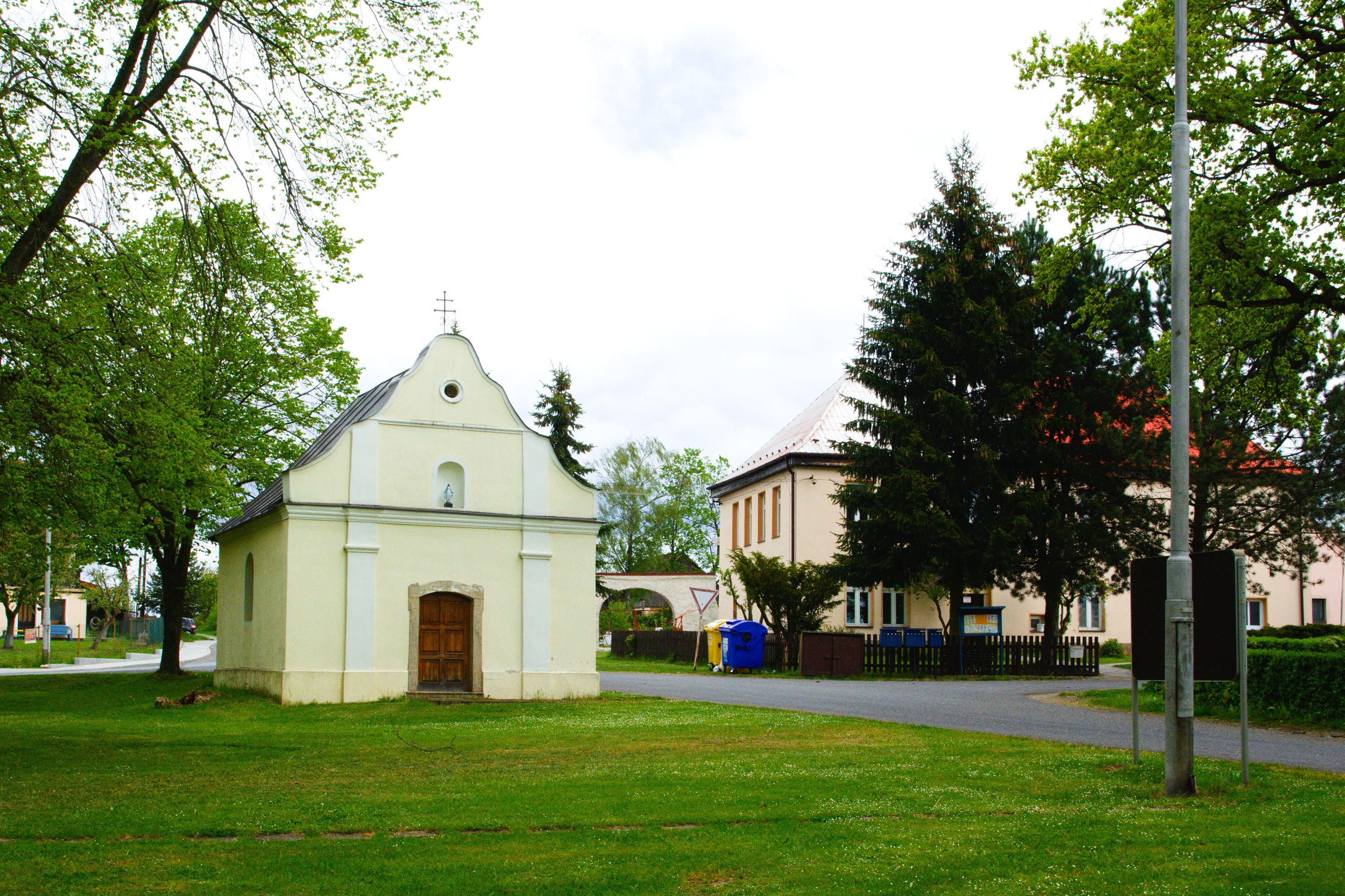 Lom u Tachova - kaplička